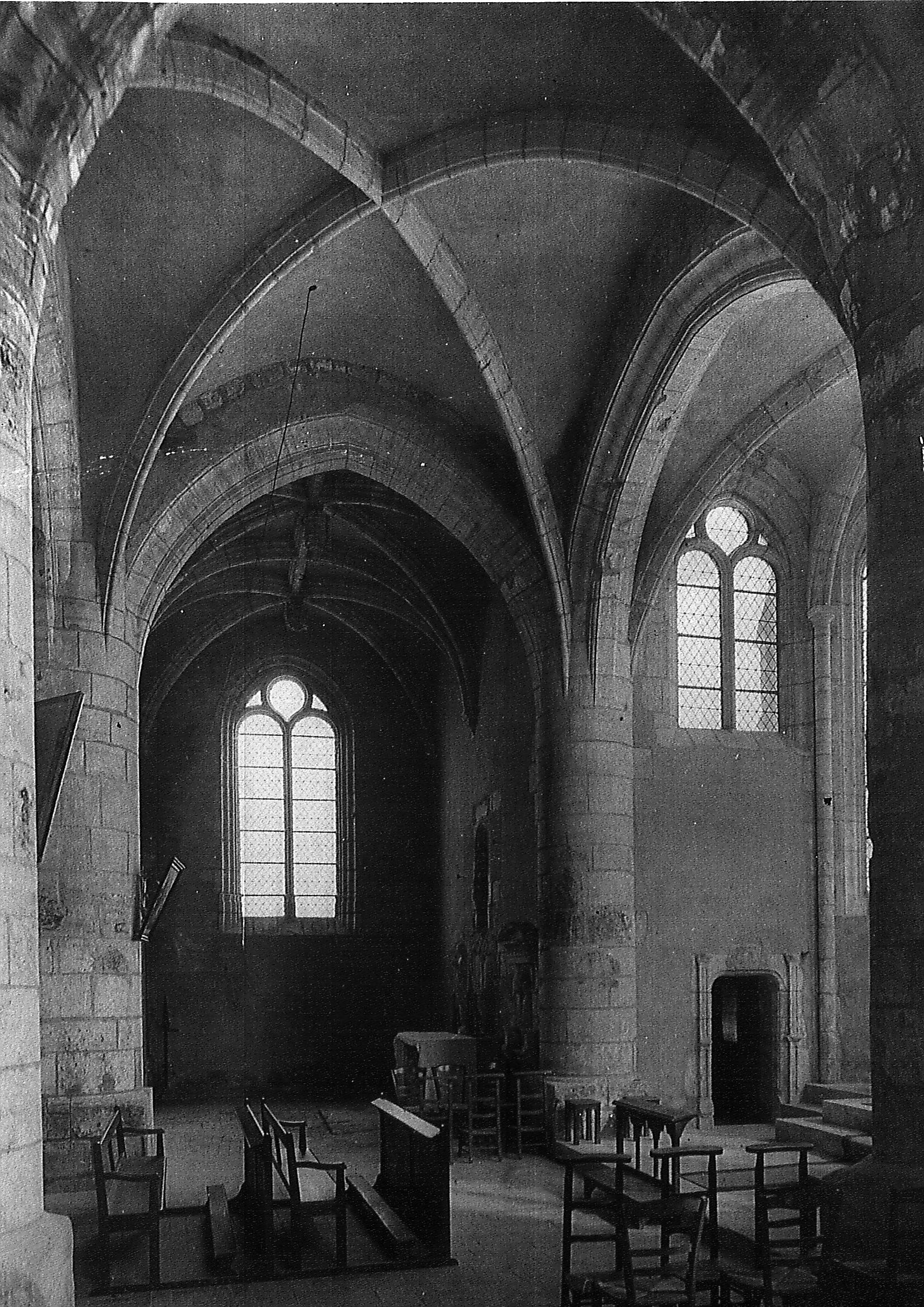 une vue de cf. titre.